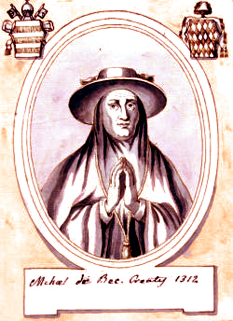 Cardinal Michel de Bois-Crespin